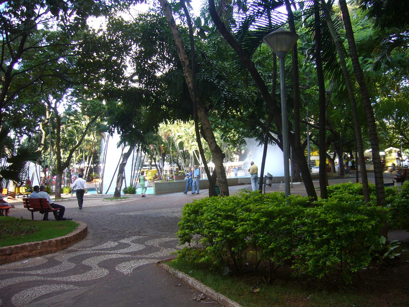 Praça no centro de São José do Rio Preto - SP, BRASIL